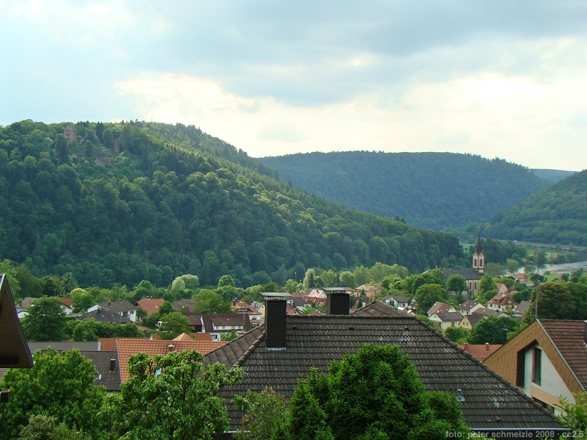 Blick über die Dächer von Neckargerach zu der über dem anderen Neckarufer liegenden Minneburg